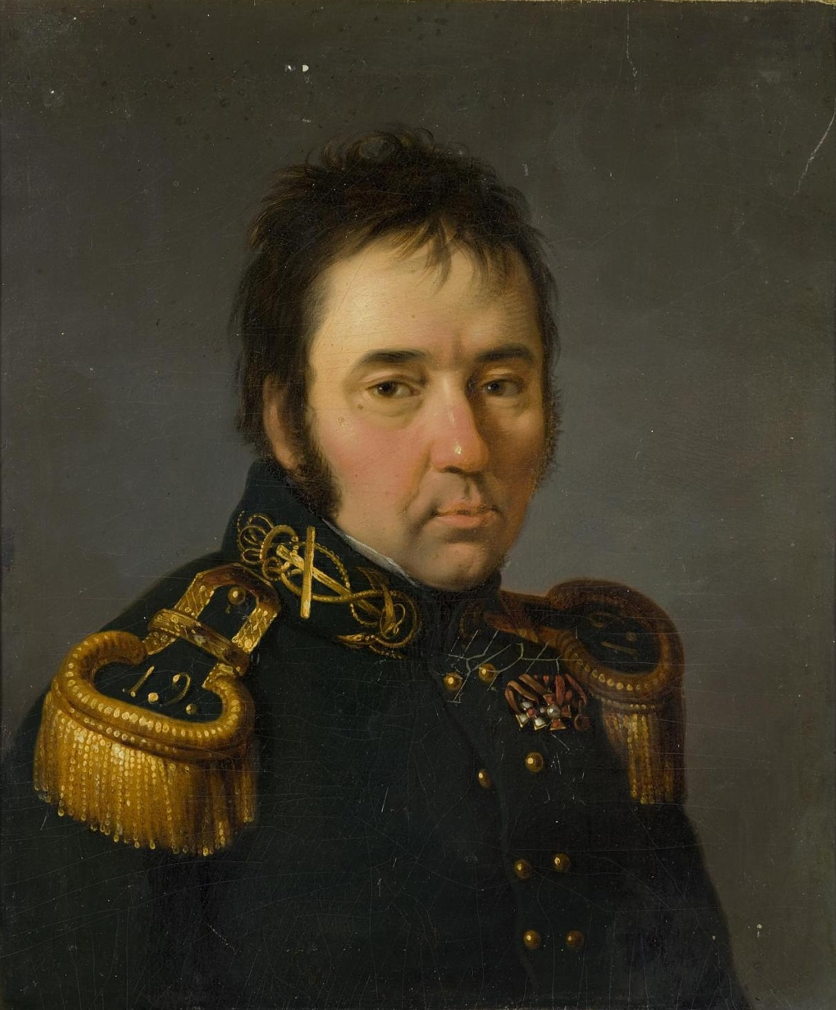 Портрет капитана 1-го ранга В.М. Головнина